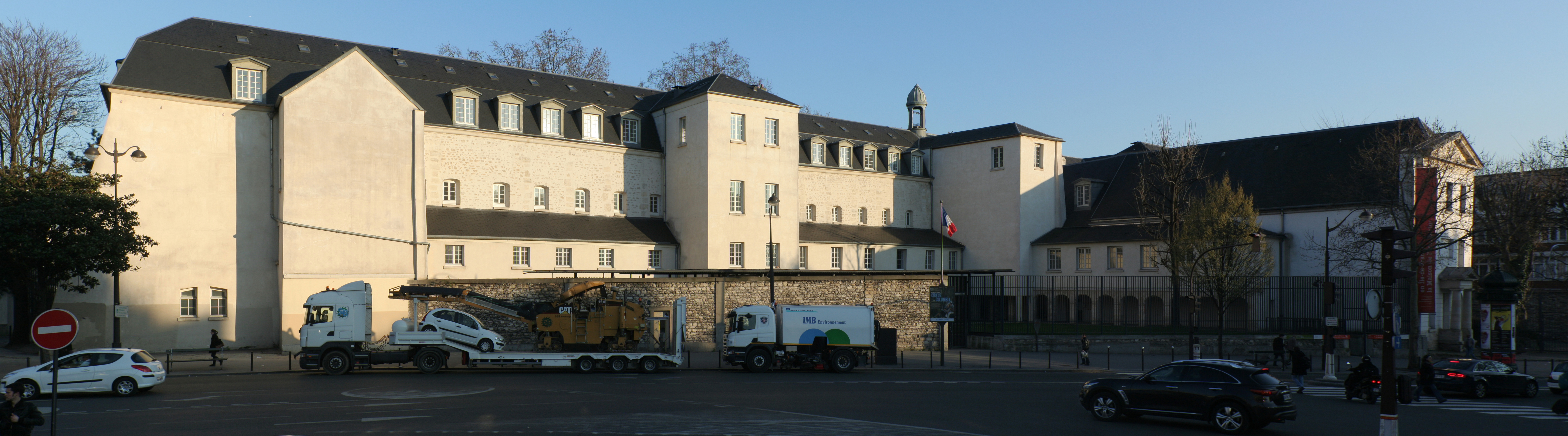 Vue générale de l'ancien couvent des Récollets/hôpital Villemin, côté rue du Faubourg-Saint-Martin, Paris.